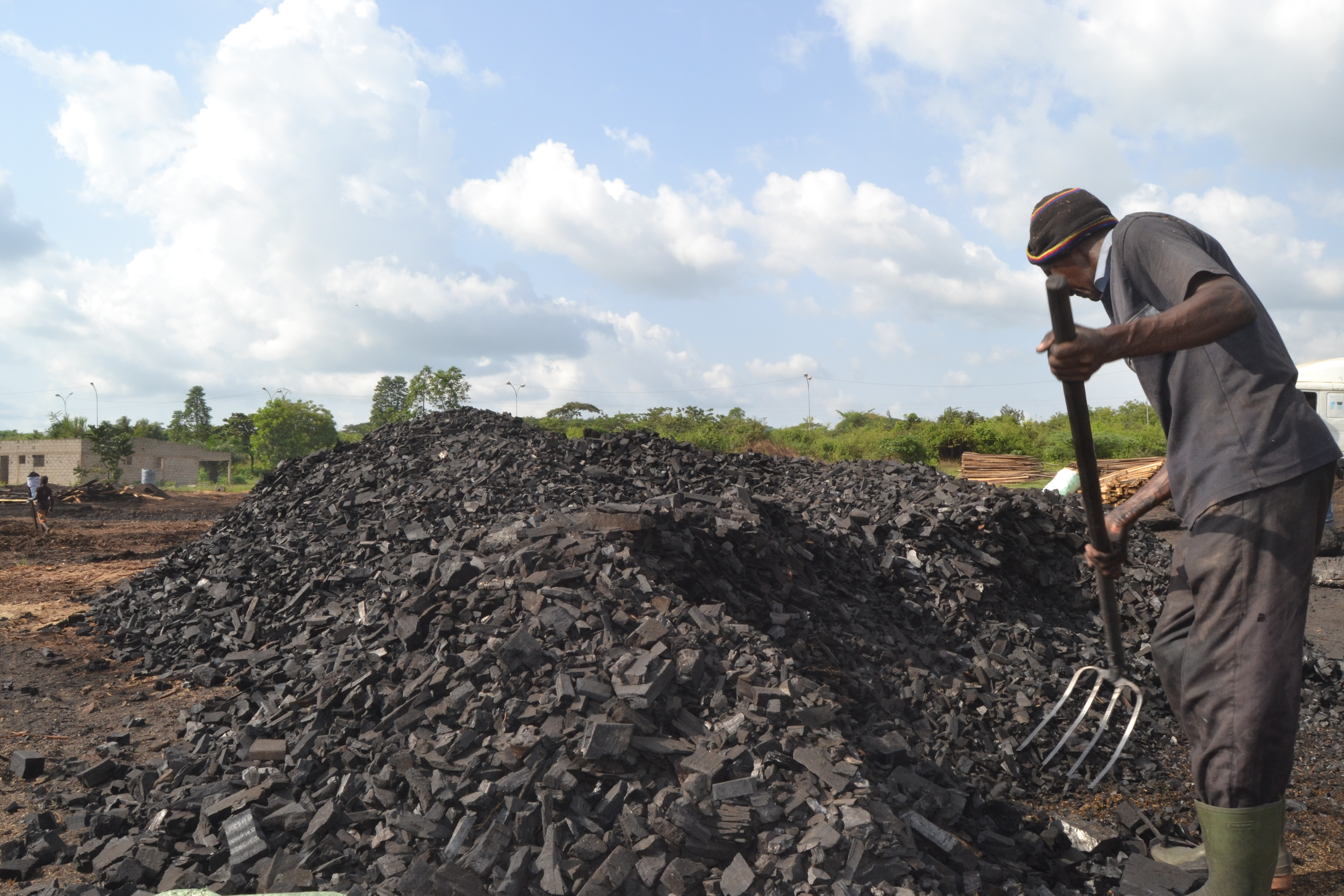 Fabricant de charbon de bois sur son site de production à Yamoussoukro, Côte d'Ivoire. This is an image of "African people at work" from Ivory Coast